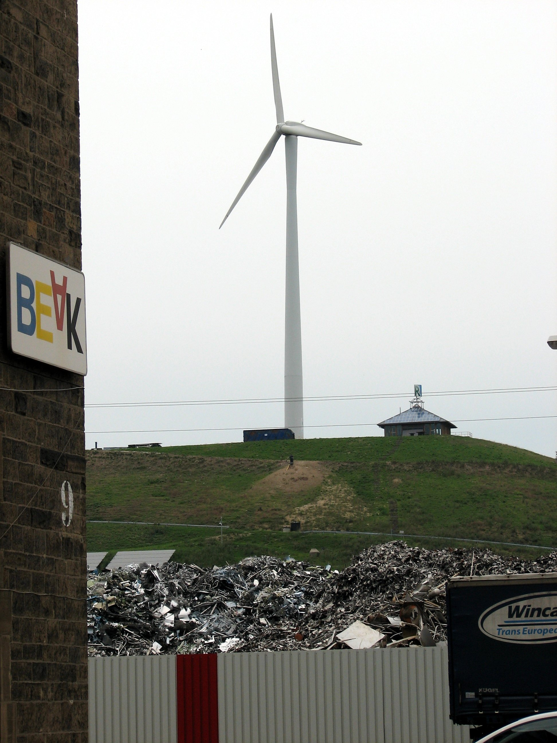 Rheinhäfen Karlsruhe